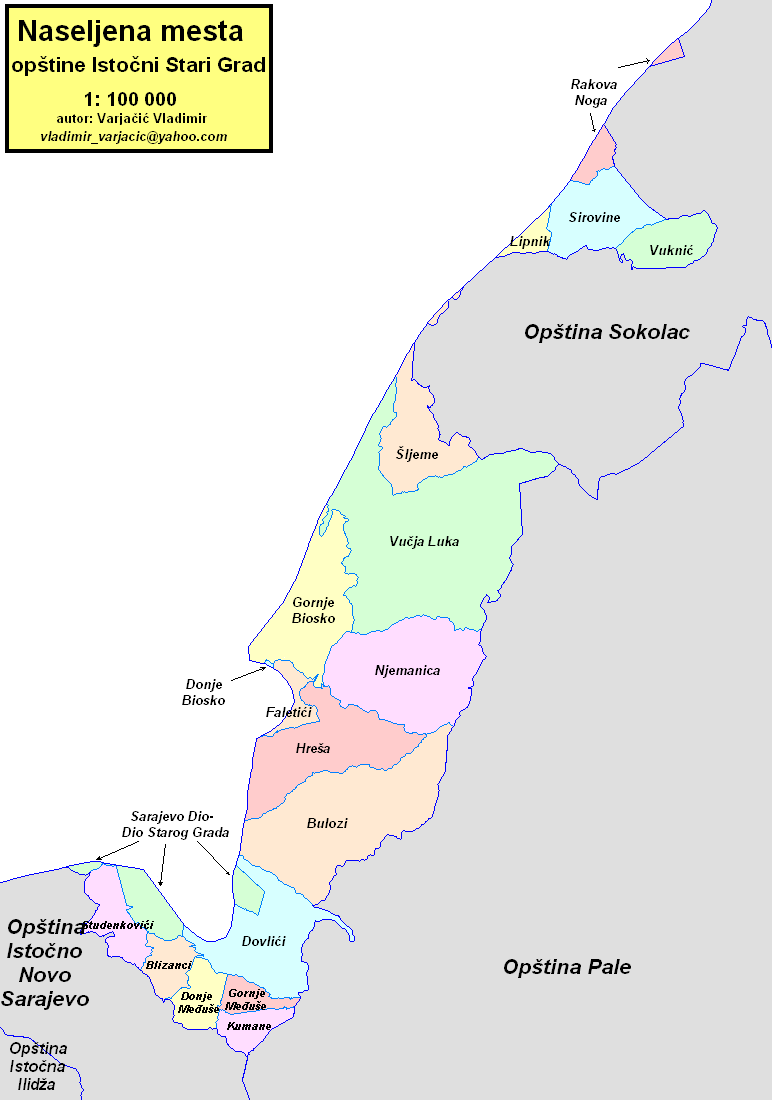 Opština Istočni Stari Grad